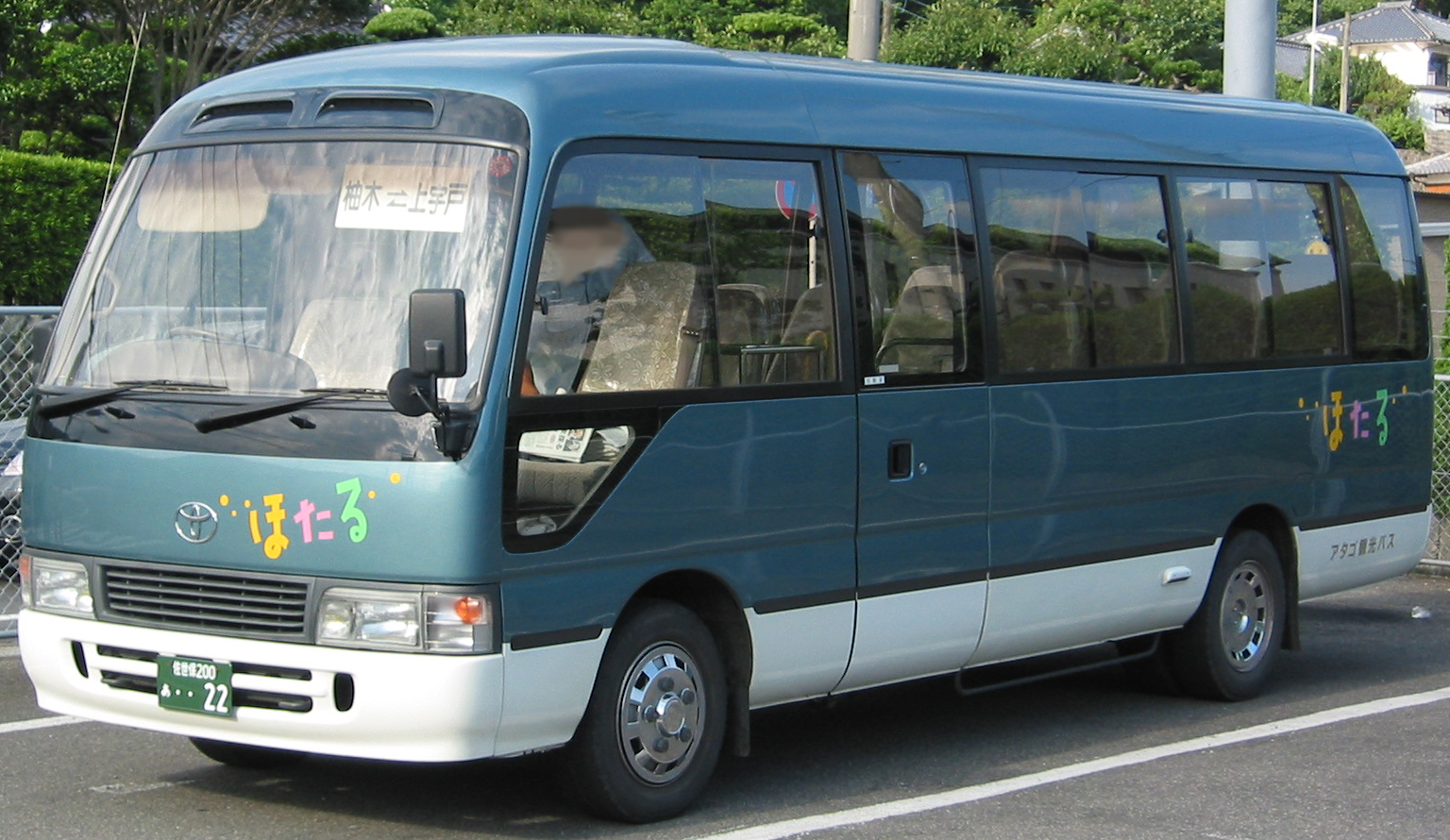 アタゴ商事（アタゴ観光バス） 路線バスの車両